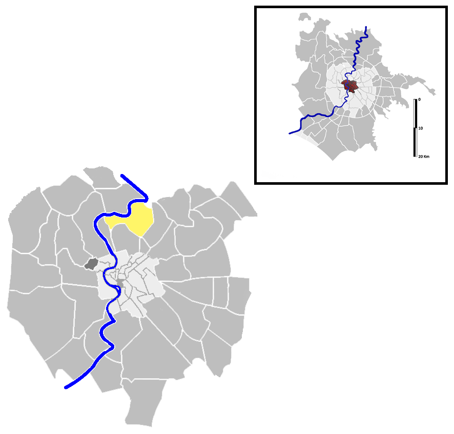 Parioli